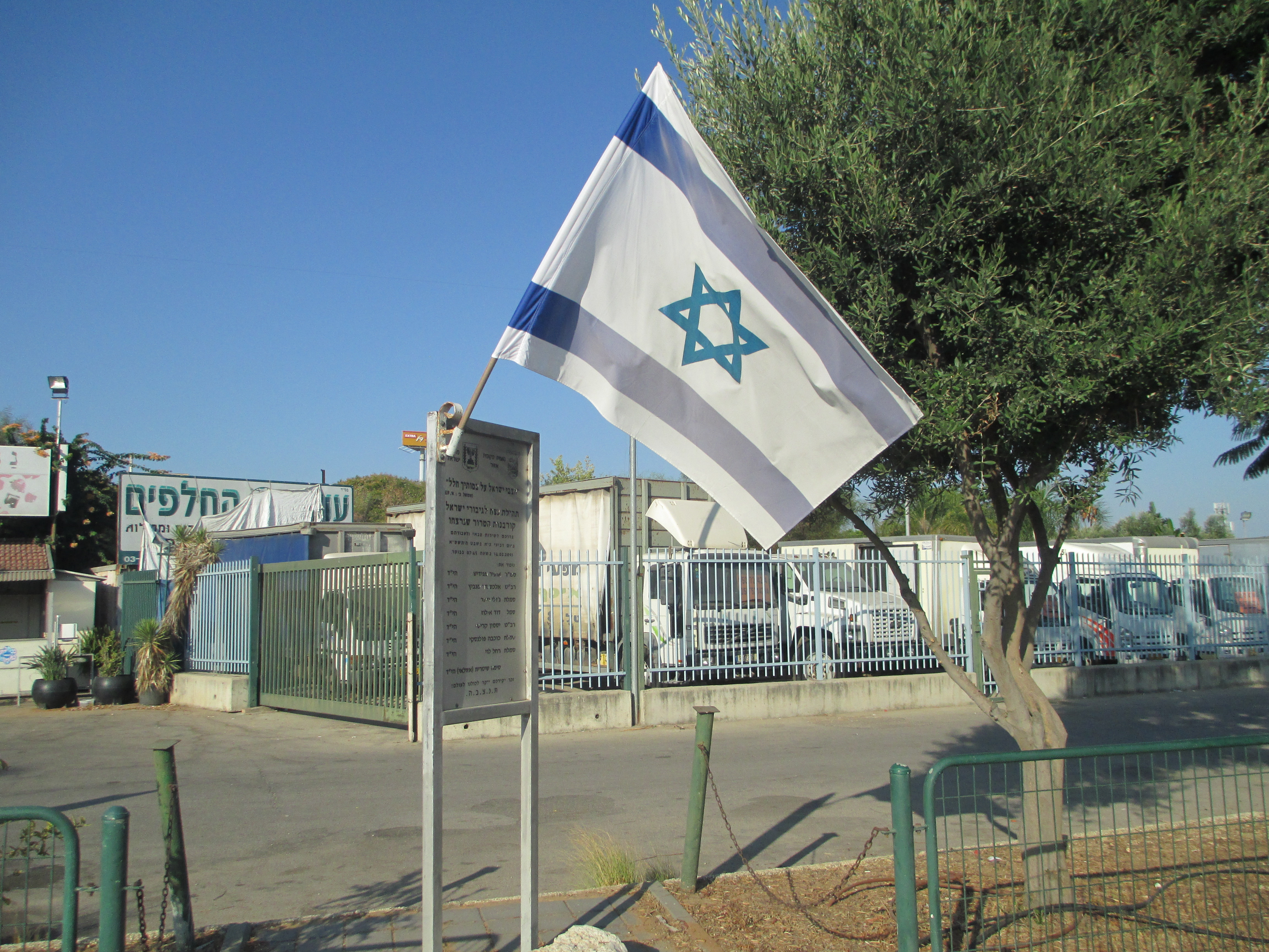 אנדרטה במקום הפיגוע באזור ב-2001